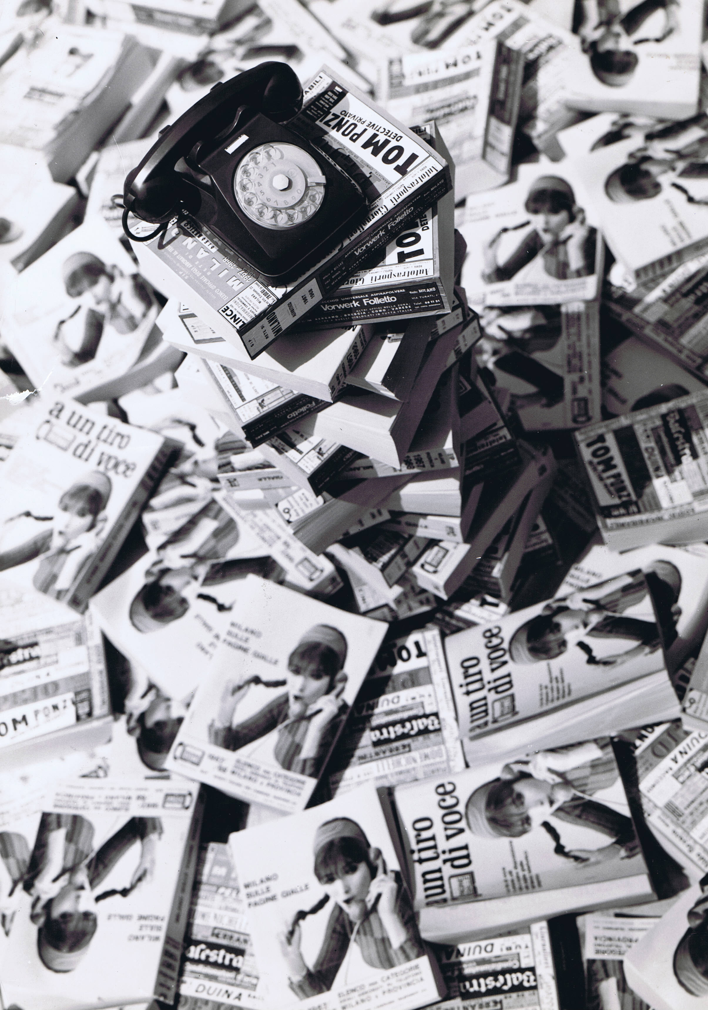 Elenchi telefonici abbonati e Pagine Gialle di Milano, 1967-68. Foto Archivio Storico TIM